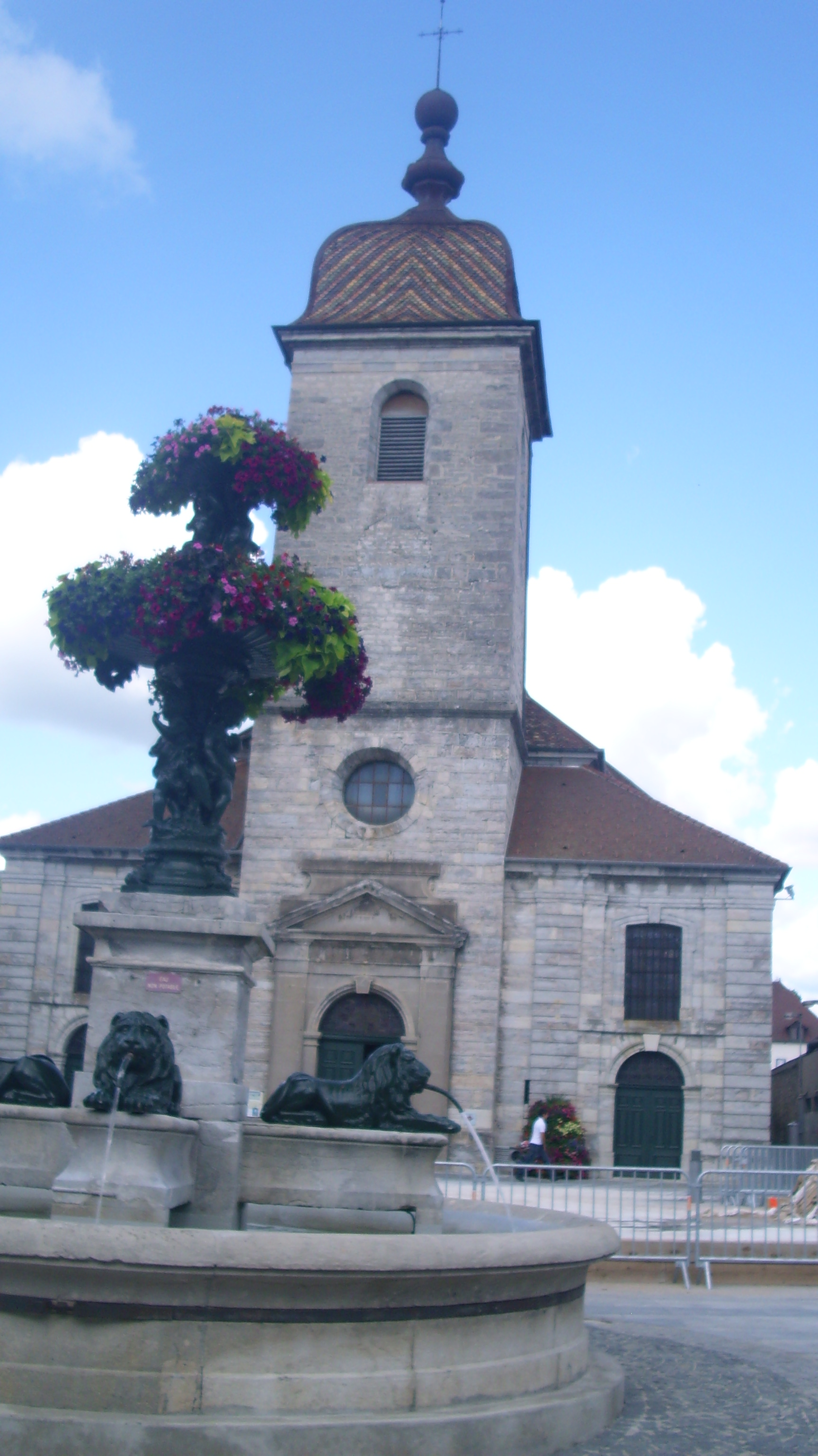 Une des deux églises de Champagnole (39), situé a coté de la mairie.